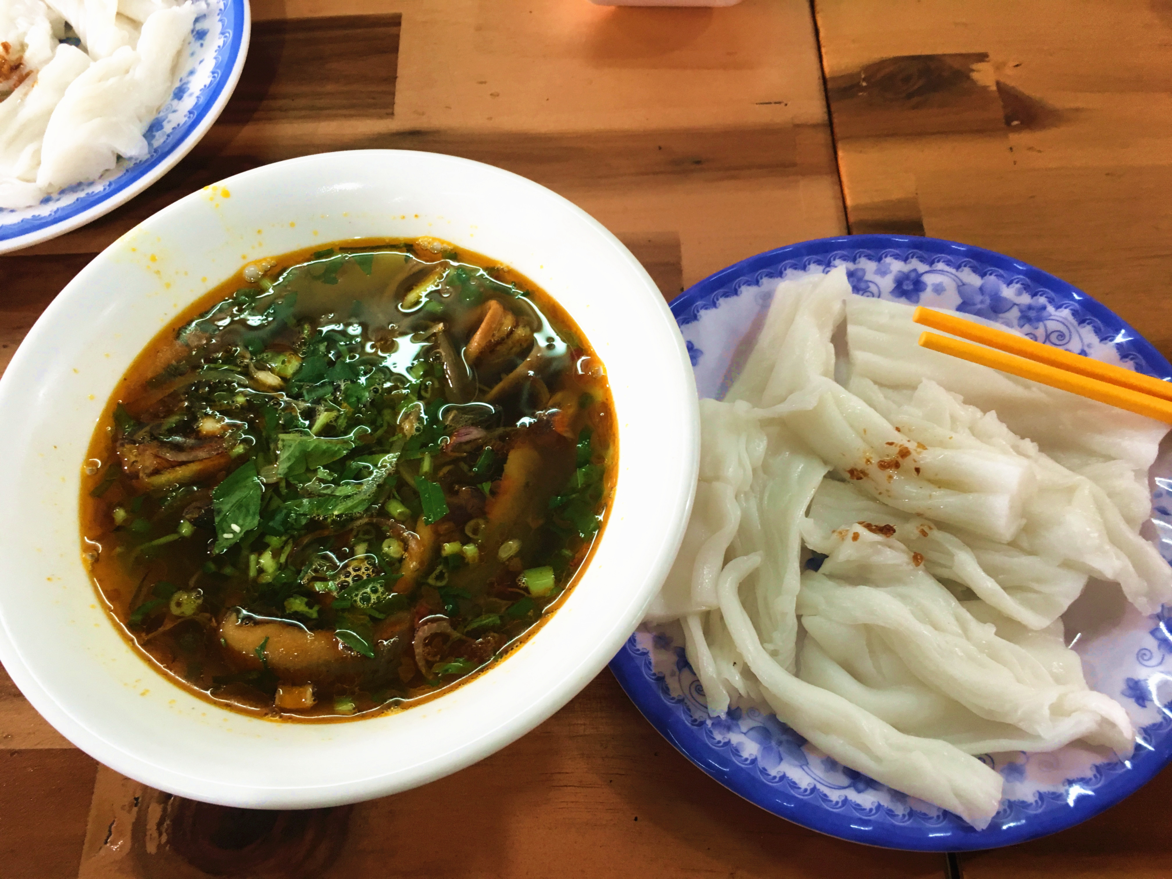 Súp lươn ăn kèm cùng bánh mướt kiểu Nghệ An